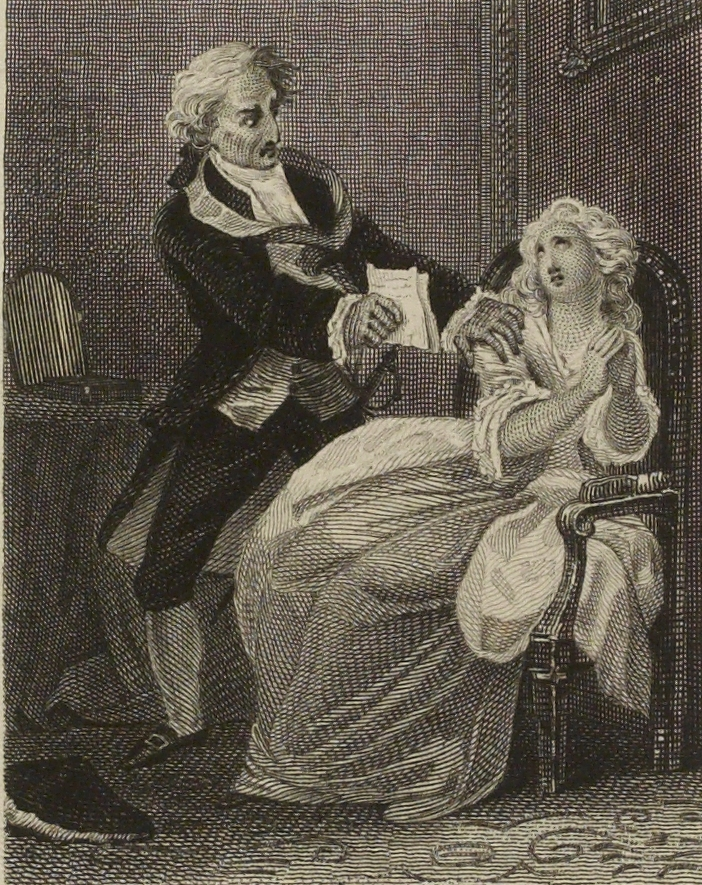 William Ashby nach Alexandre-Joseph Desenne (tätig 1785–1827): Illustration zum Drama "La mère coupable" (1792) von Pierre-Augustin Caron de Beaumarchais (1732–1799). (Graf Almaviva zeigt seiner Gattin den Abschiedsbrief ihres Geliebten Chérubin.) Stich, 12 x 12,5 cm. Musée Carnavalet. Paris.